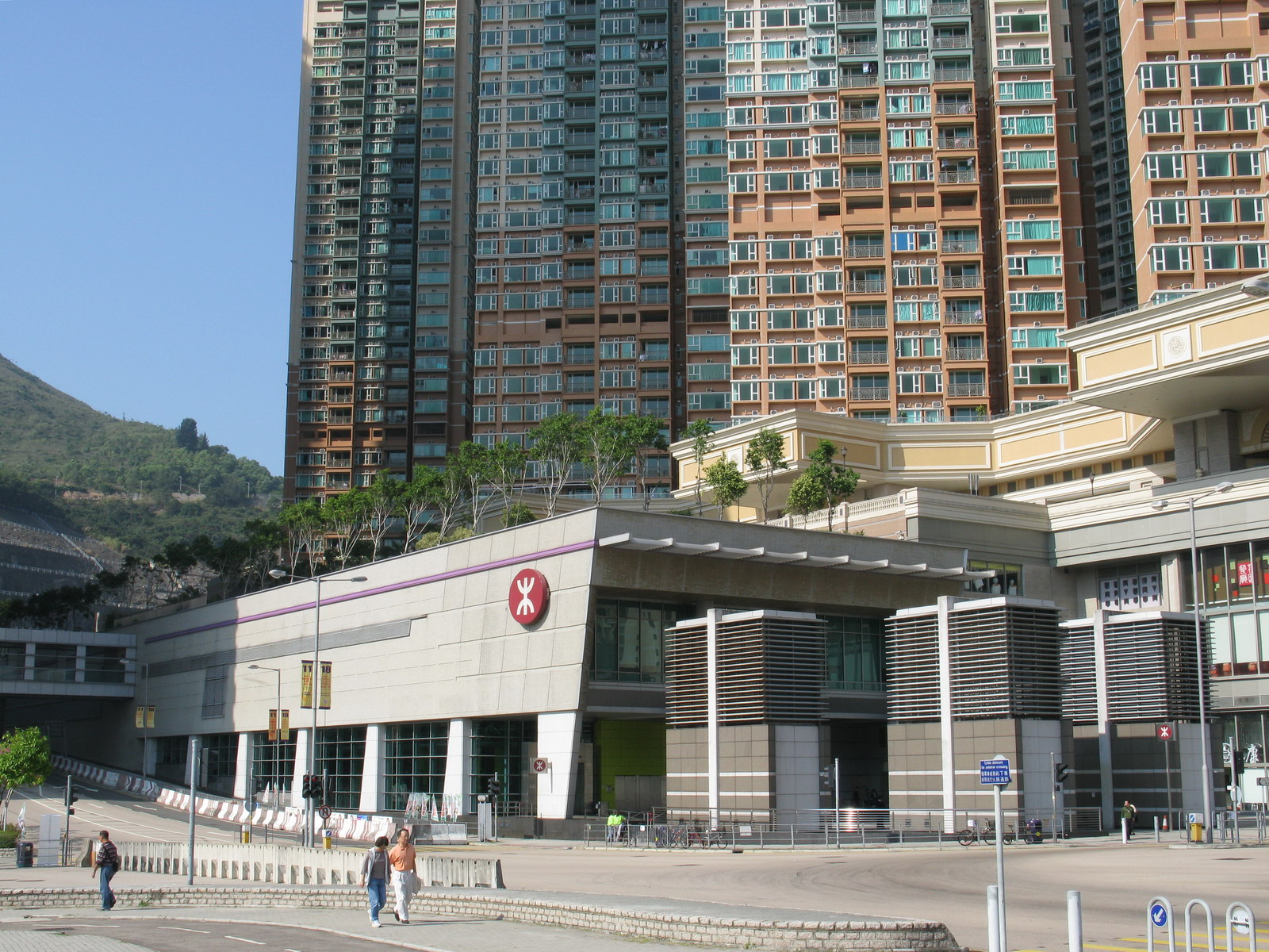 調景嶺站 Tiu Keng Leng Station